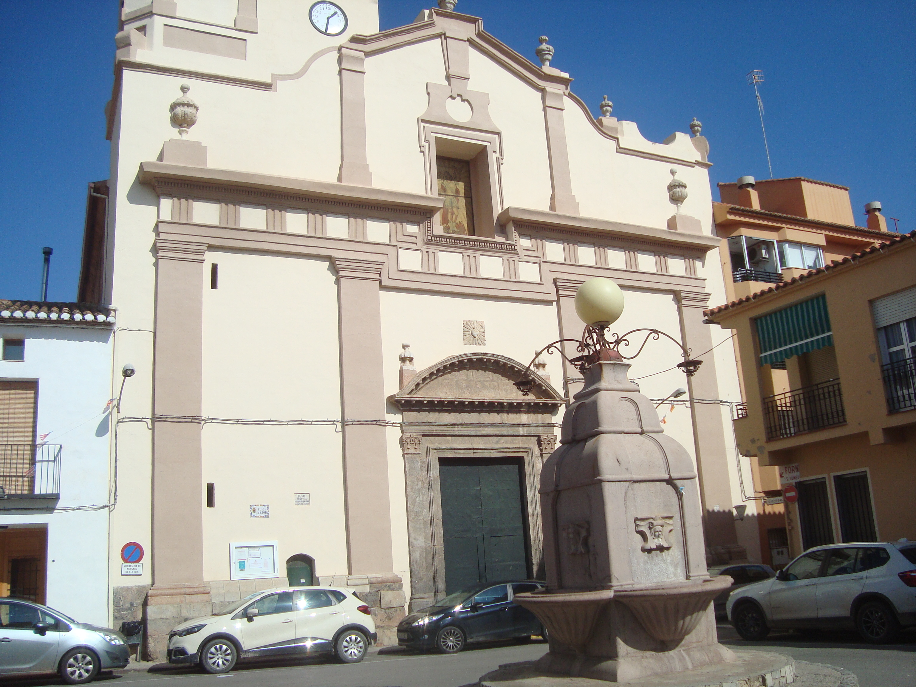 Església parroquial de Sant Miquel Arcàngel (Quart de les Valls) 12.101-003.